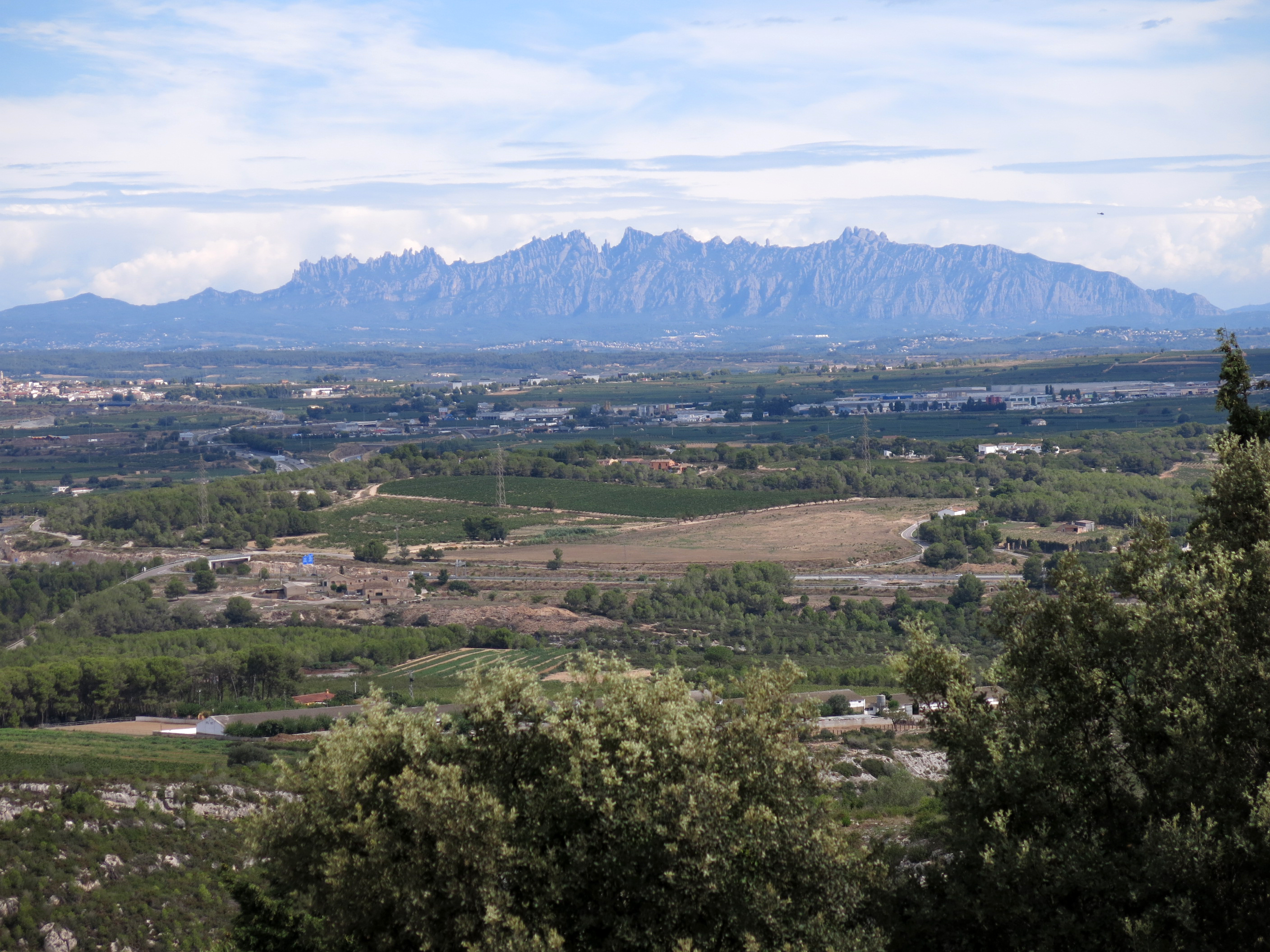 La plana del Penedès i Montserrat des del jaciment d'Olèrdola